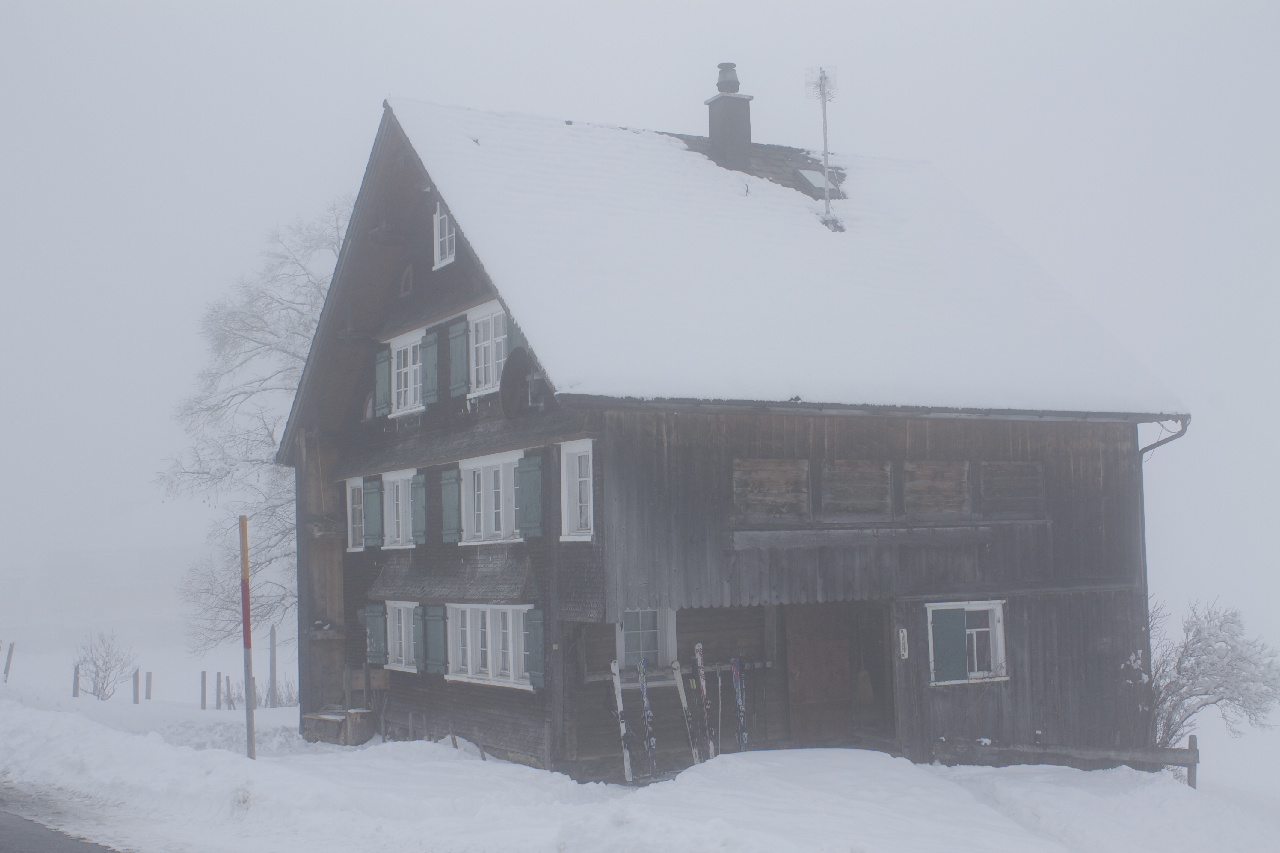 Wildhaus